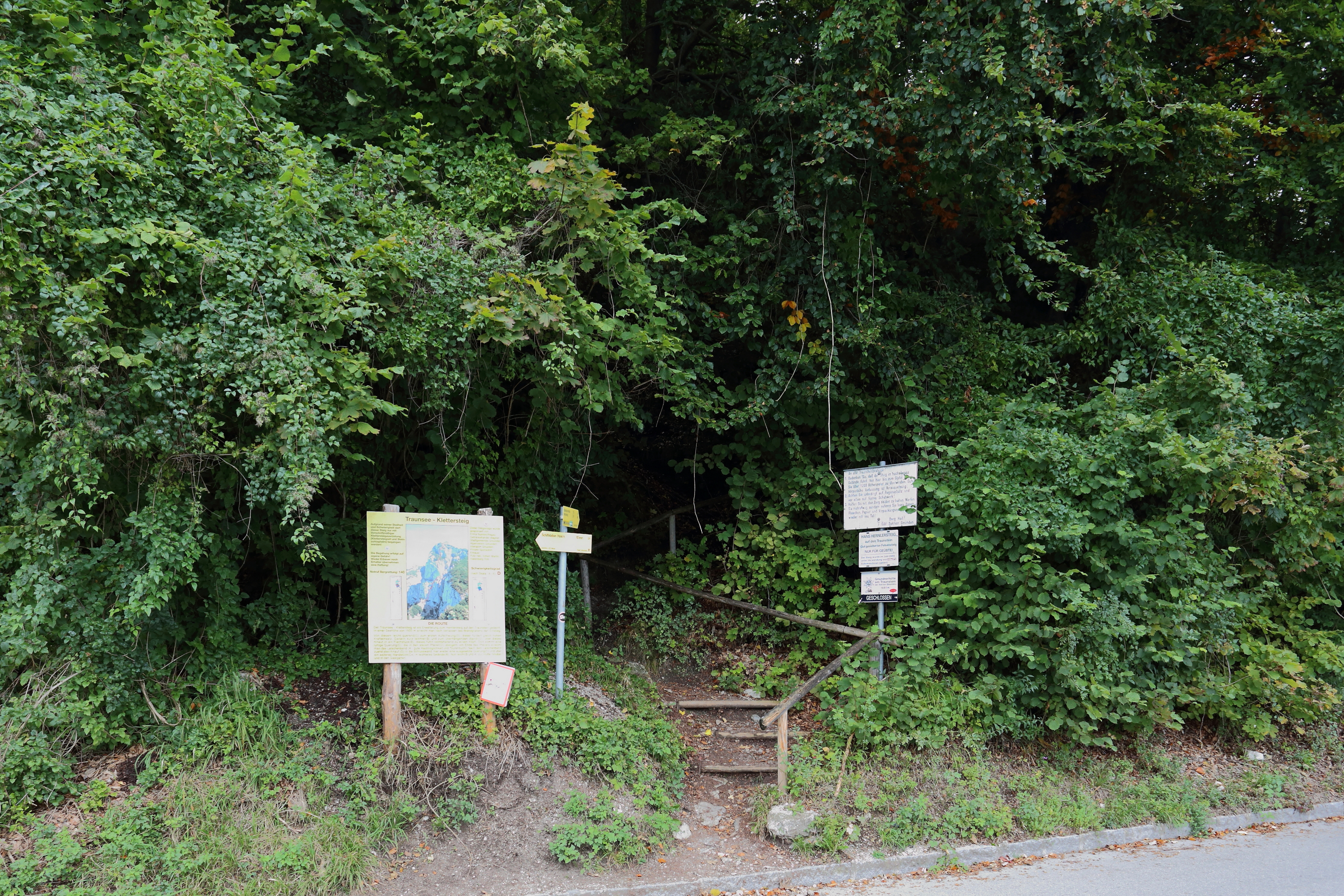 Der untere Einstieg des Hernlersteiges, der westseitig direkt auf den Traunstein führt. Der Steig wurde 1905 eröffnet und ist nach dem Gmundner Alpinisten Hans Hernler († 1933) benannt.